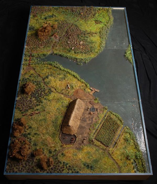 Objectgegevens Titel: Maquette boerderij uit de IJzertijd op Voorne-Putten met vee en landbouwgrond - totaaloverzicht Beschrijving:Driedelige maquette. A is het deel met boerderij en akkerbouwgrond, B het middenstuk met bootje en en C de wijdere omgeving met heide. Reconstructie situatie IJzertijd, ca 400 vChr. Herkomst:Bureau Oudheidkundig Onderzoek van Gemeentewerken Rotterdam (BOOR). Maakte deel uit van een reizende tentoonstelling. Trefwoorden:gebouw, maquette, model Vervaardiger:Werner Kannamüller Datering:1988 - 1989 Materiaal:kunststof, textiel, hout, papier, verf, plantaardig_materiaal, vezelplaat Afmetingen: (cm) hg 35,0 / br 85,0 / dp 144,5 Associatie:Maasmondgebied, ijzertijd, archeologie, prehistorie, Nissewaard, Spijkenisse, Bernisse, Voorne-Putten Vorm & decoratie:boerderij, vee, miniatuurInventarisnr:Museum Rotterdam 74841